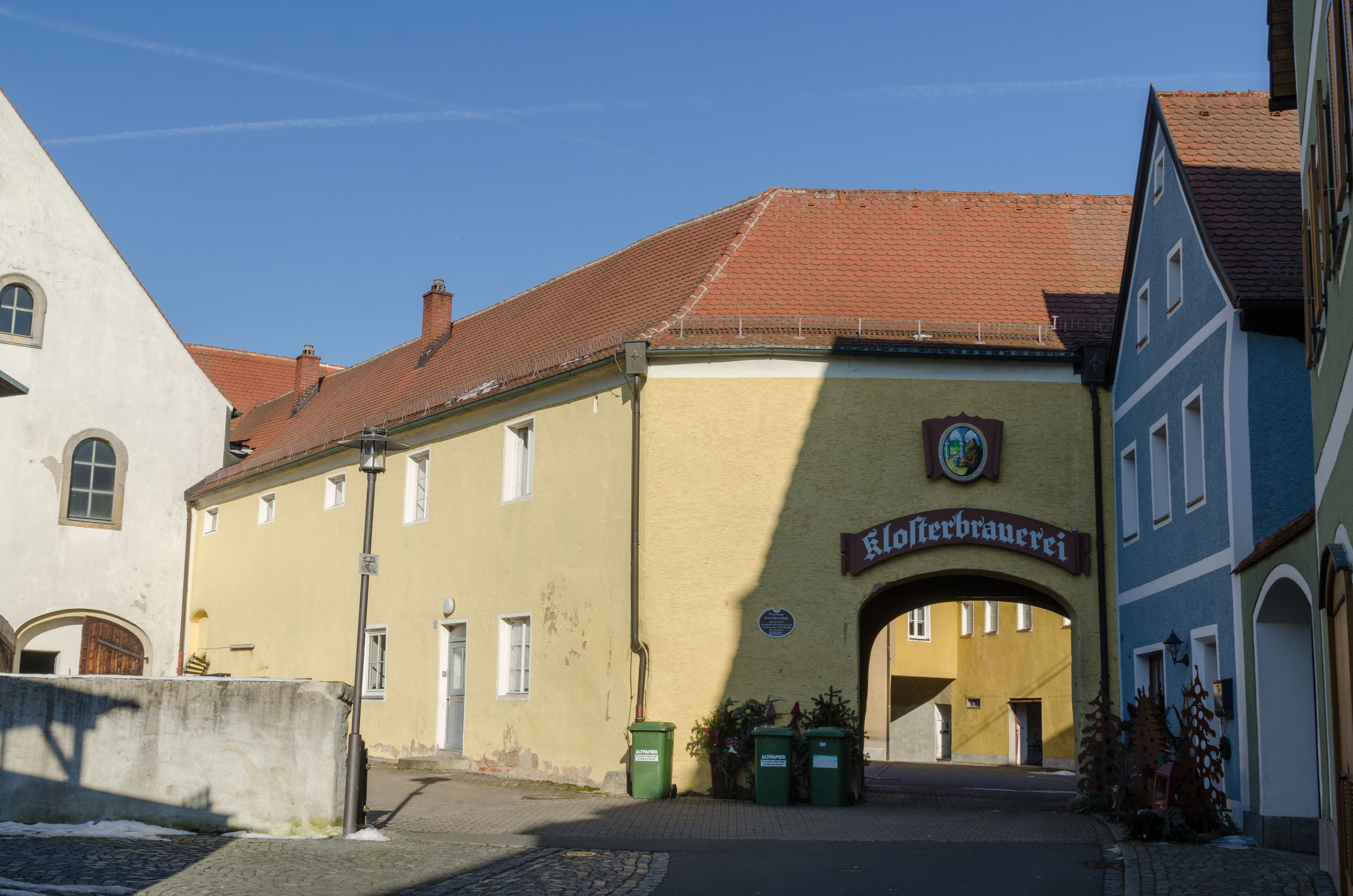 Kemnath, Klosterhofstraße 6